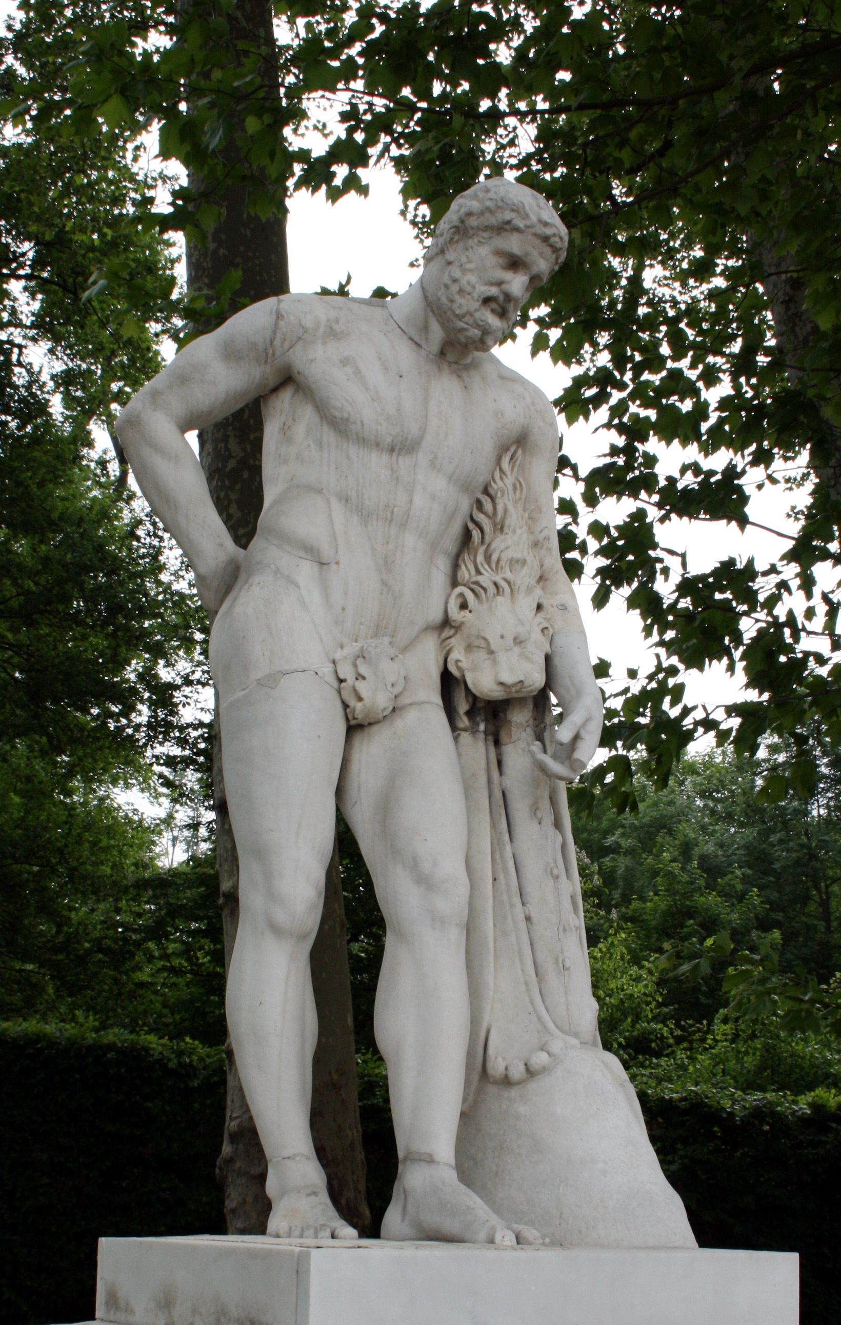 Hercule Farnese dans la demi-lune du Bassin d'Apollon du Park de Versailles